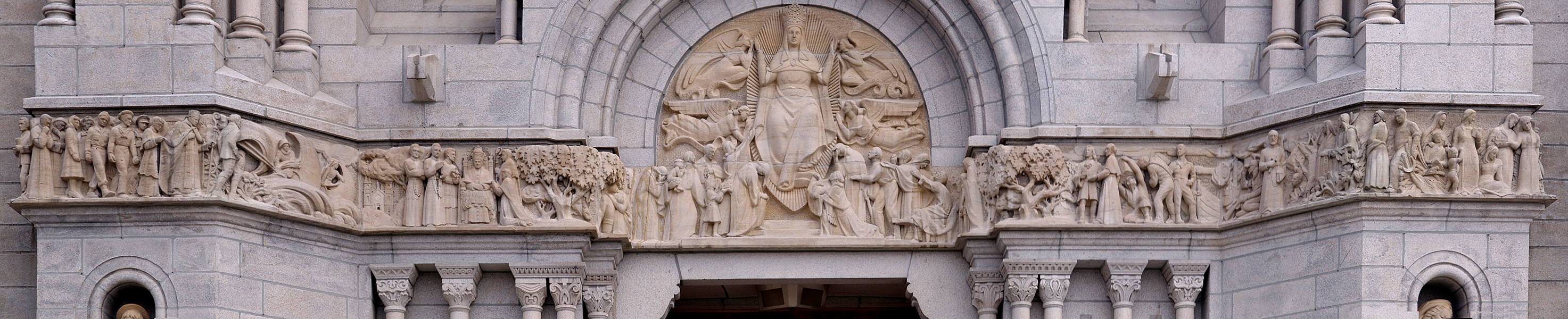 Basilique Sainte-Anne-de-Beaupré - Bas relief